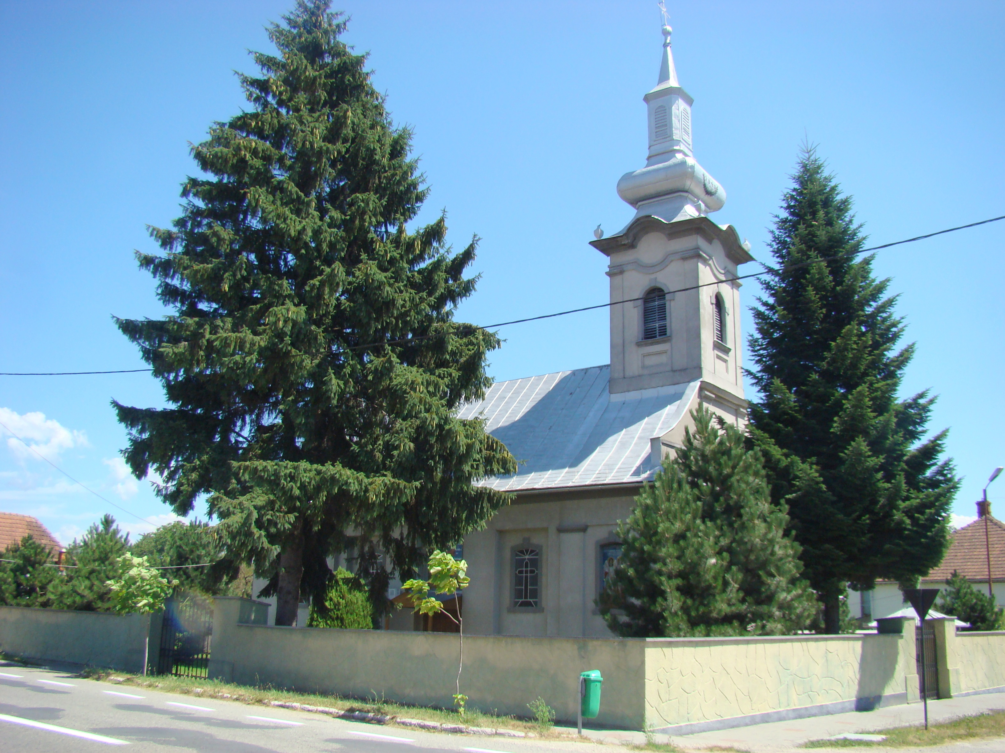 Ansamblul bisericii „Sf. Gheorghe”, oraș Oțelu Roșu, Str. Cuza Alexandru Ioan 40, Cartier Ohaba Bistrei